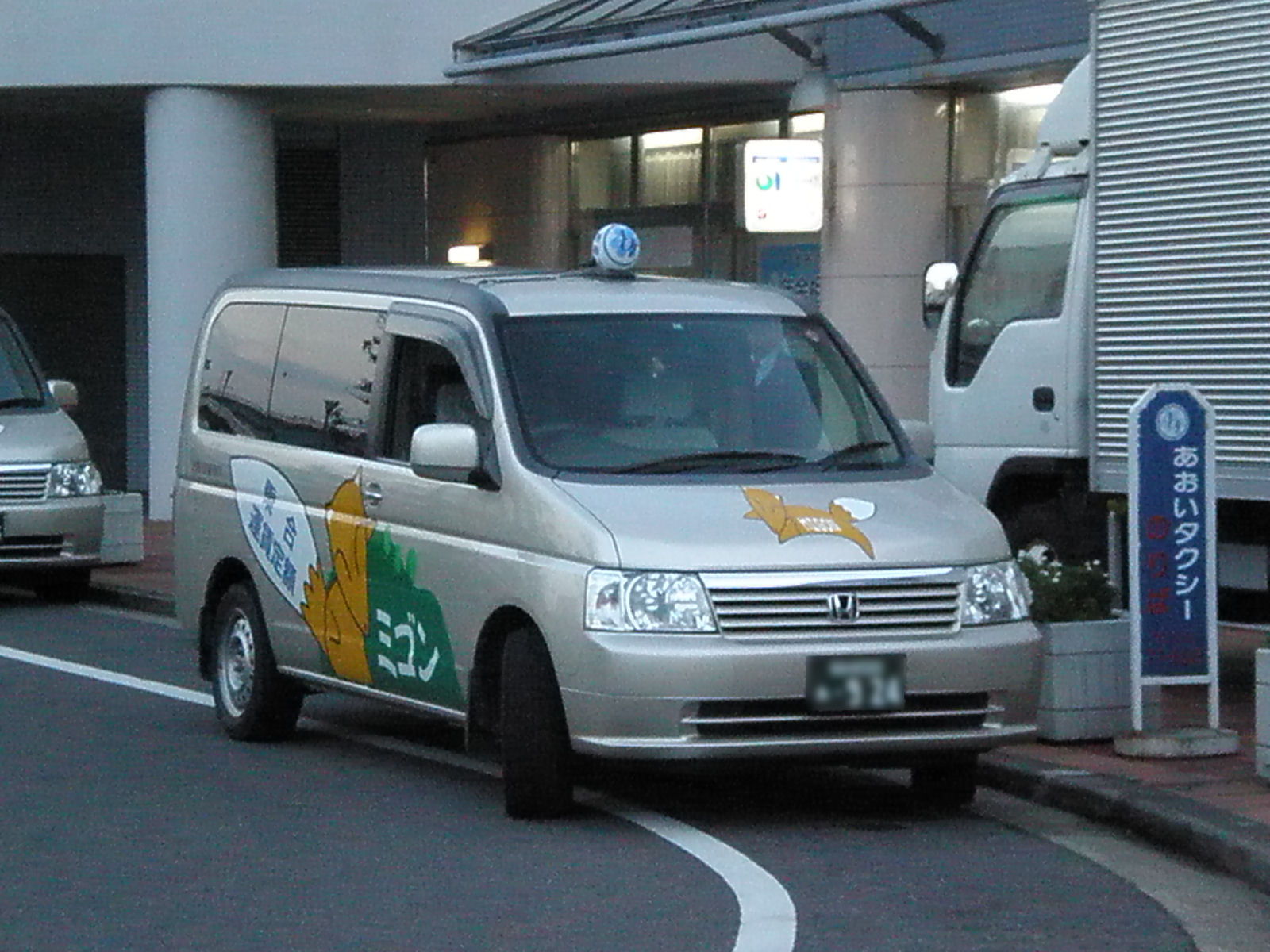 愛知県小牧市で運行さている乗合タクシー・ミゴン（撮影場所：小牧市古雅1丁目）